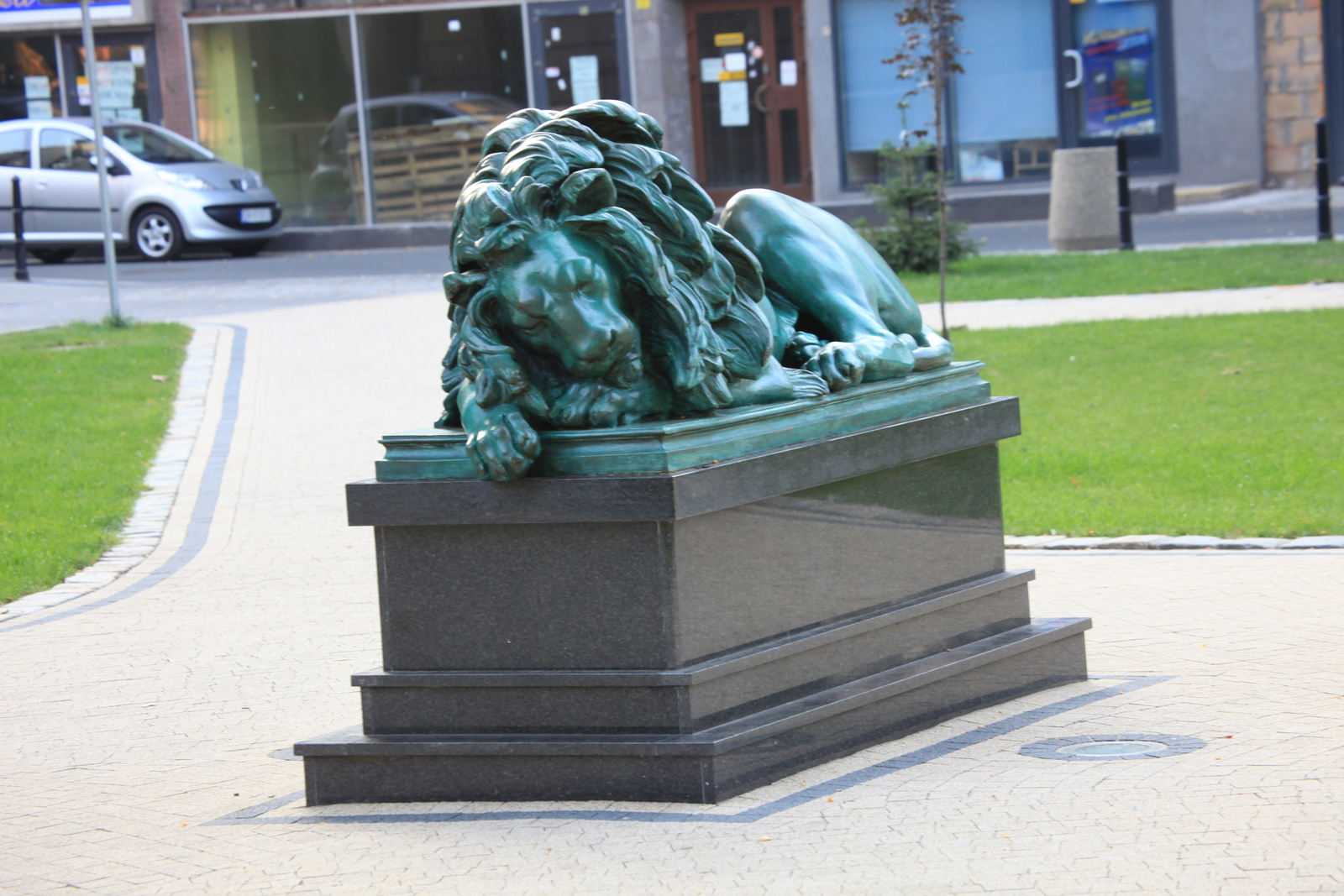 Gliwice - miasto lwów